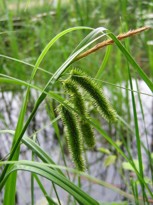 Carex pseudocyperus, Glien-See, Mecklenburg Vorpommern